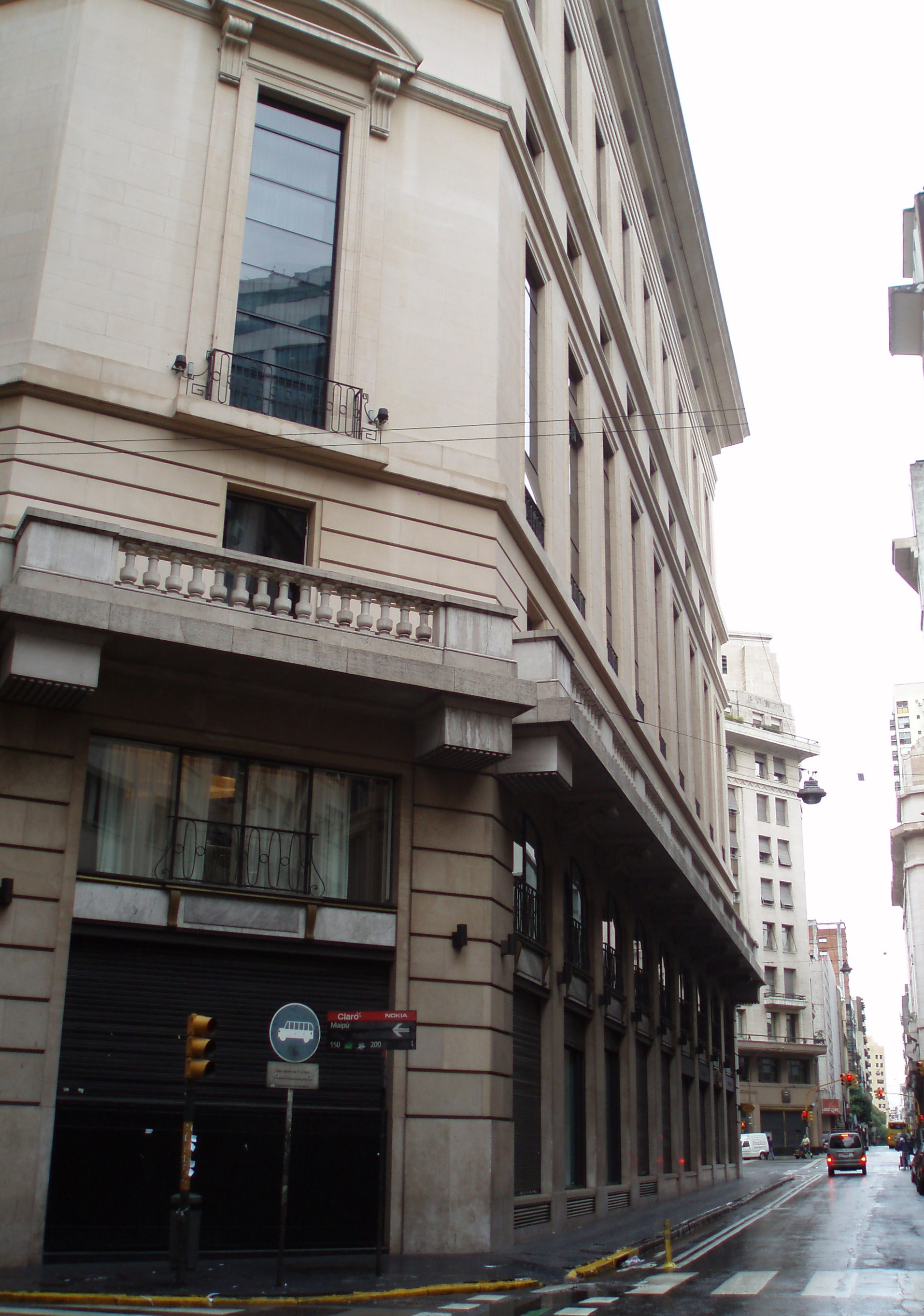 Continental Hotel de Buenos Aires, visto desde la esquina de las calle Tte. Gral. Perón y Maipú). Arquitecto: Alejandro Bustillo